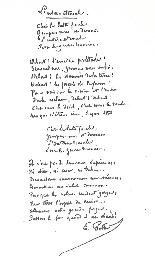 Handgeschreven tekst van de Internationale van Eugène Pottier (1816-1887)